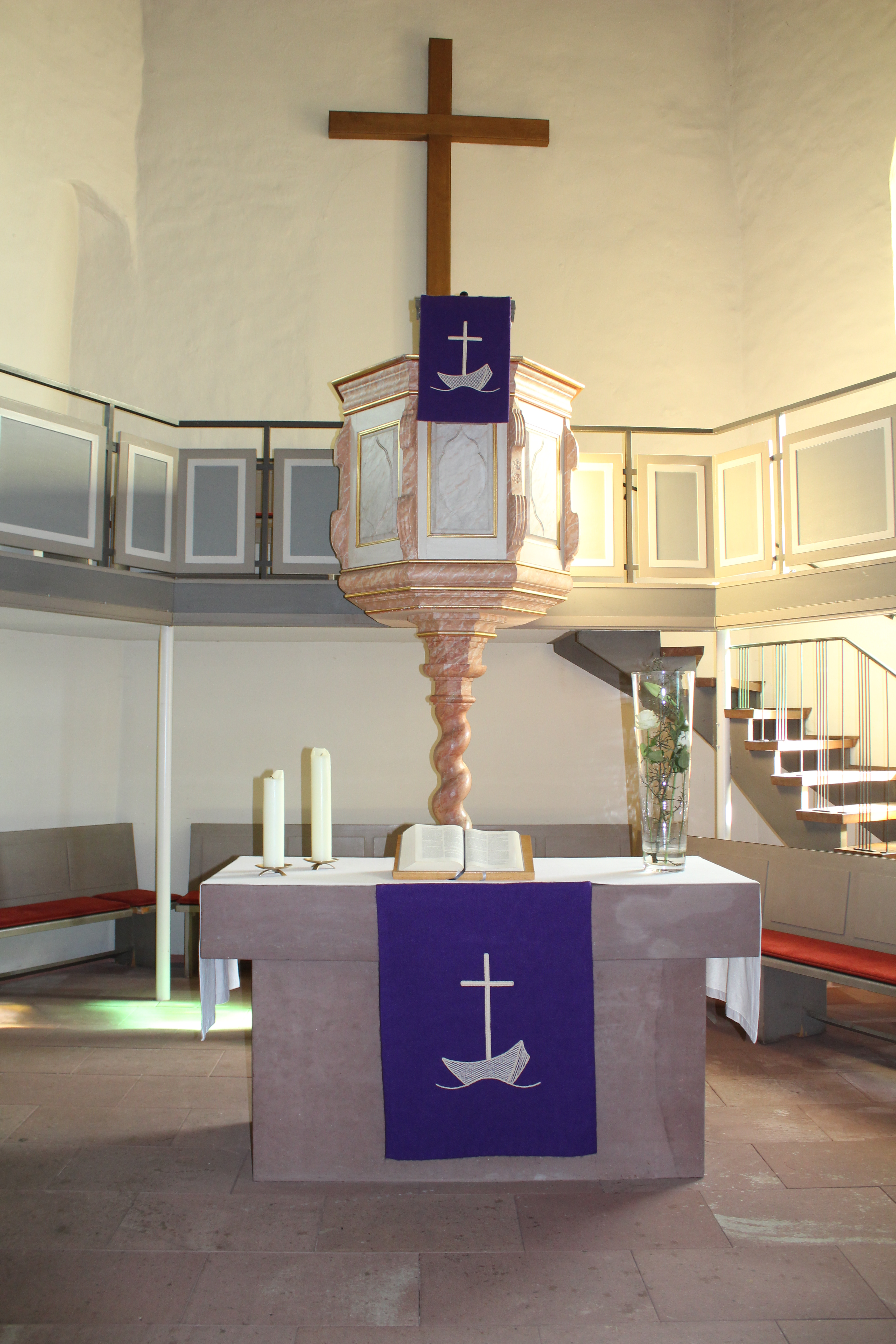 Evangelische Kirche Ostheim (Nidderau), Main-Kinzig-Kreis, Hessen, Deutschland